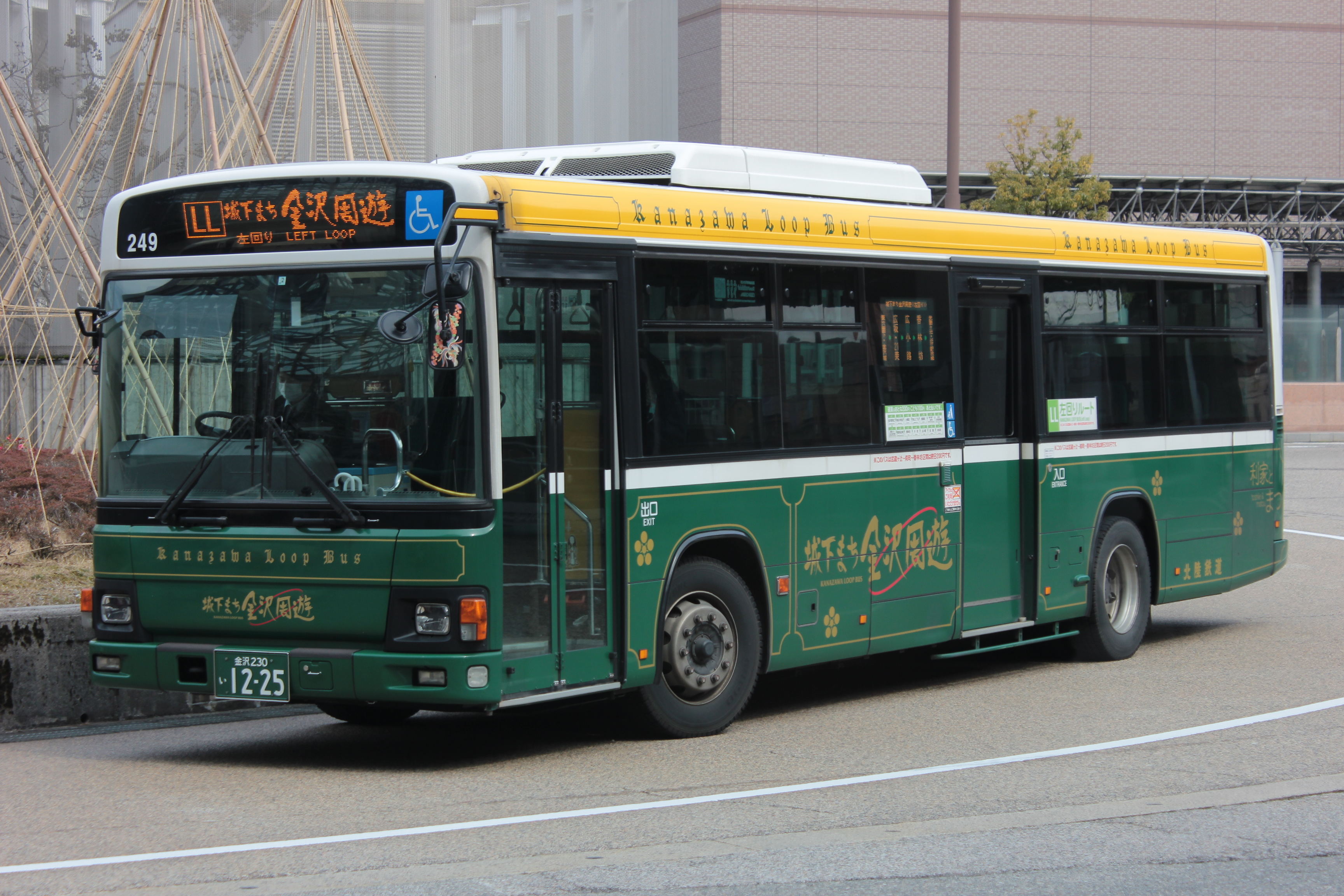 北陸鉄道の城下まち金沢周遊（左回りルート） Canon EOS Kiss X5